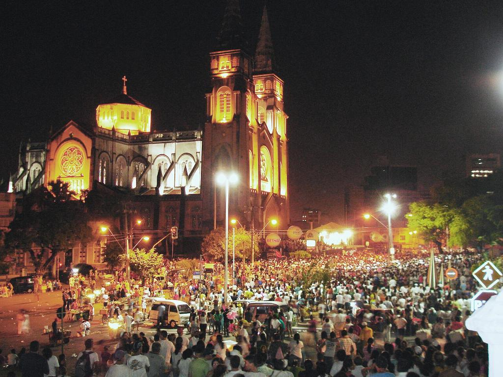 Sétima Caminhada com Maria, Fortaleza (Catedral Metropolitana de Fortaleza)